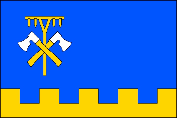 vlajka, Hoštejn, okres Šumperk